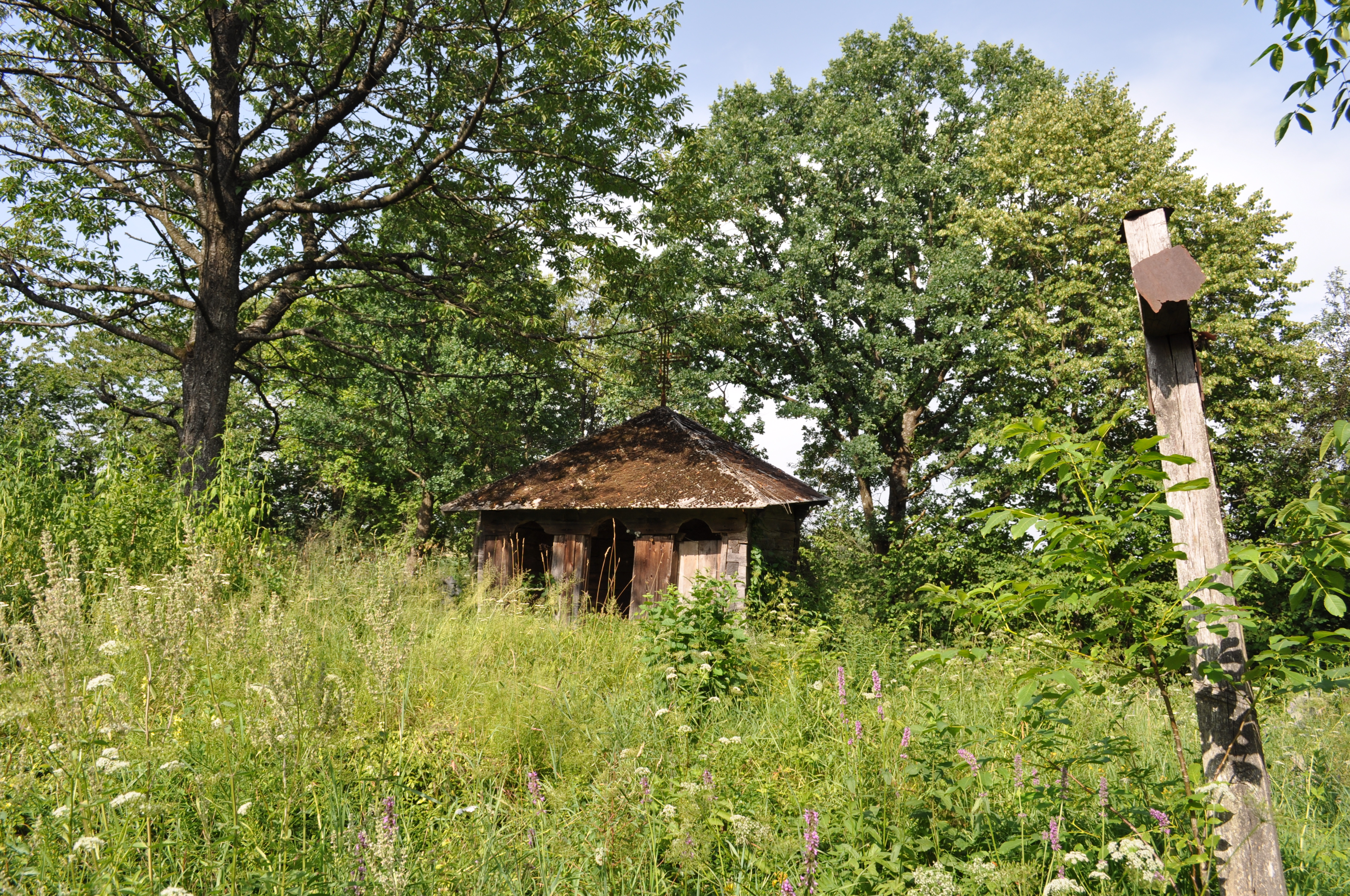 Absida bisericii de lemn "Sf. Arhangheli Mihail şi Gavril" , sat aparţinător CUFOAIA; oraş TÂRGU LĂPUŞ